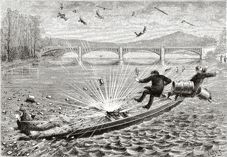 Gravură prezentând explozia dispozitivului lui Alexandru Ciurcu la 16 decembrie 1886